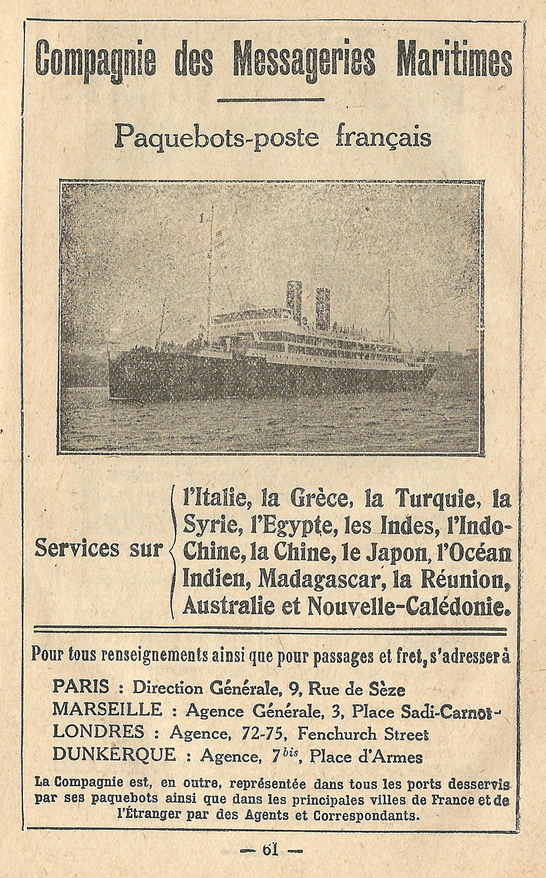 Réclame de la Compagnie des Messageries Maritimes, en 1921